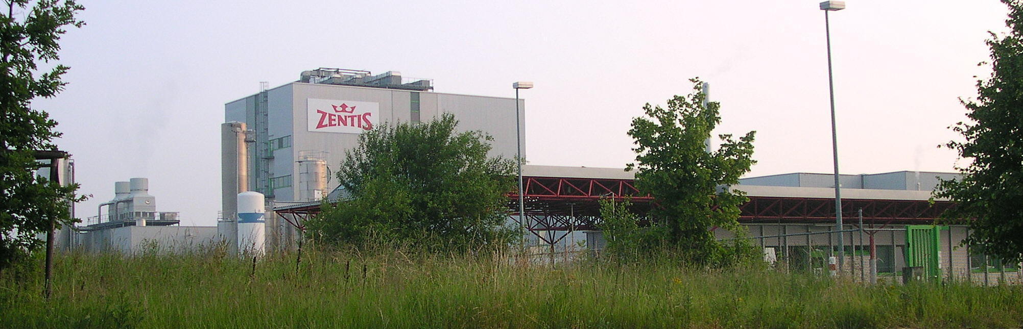 Aachen, Zentis-Gelände an der Debyestraße